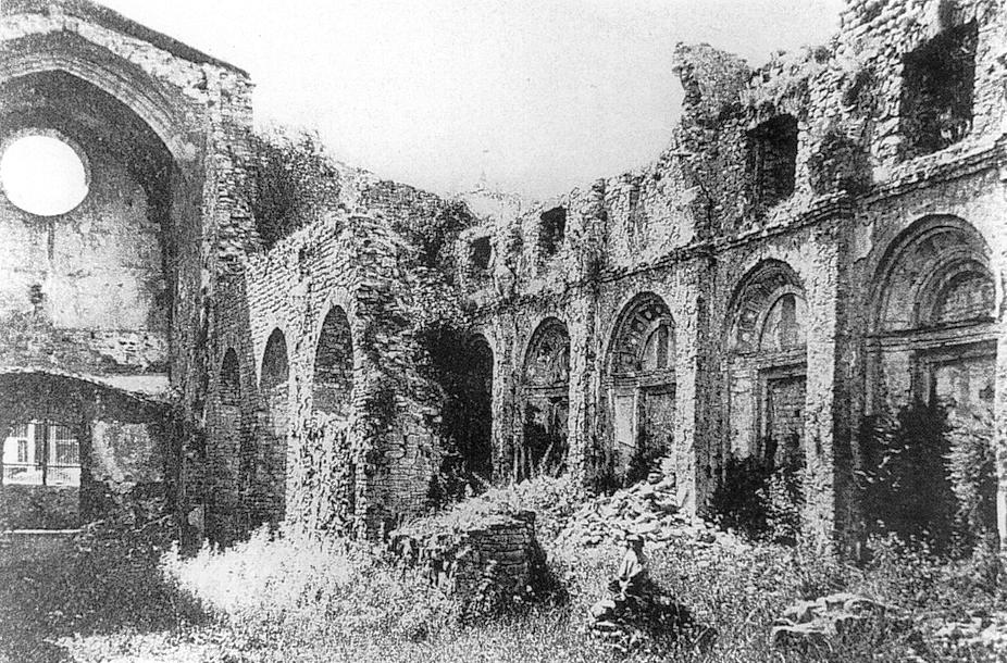 Fanatisme laic i anticatòlic. Ripoll 1835.